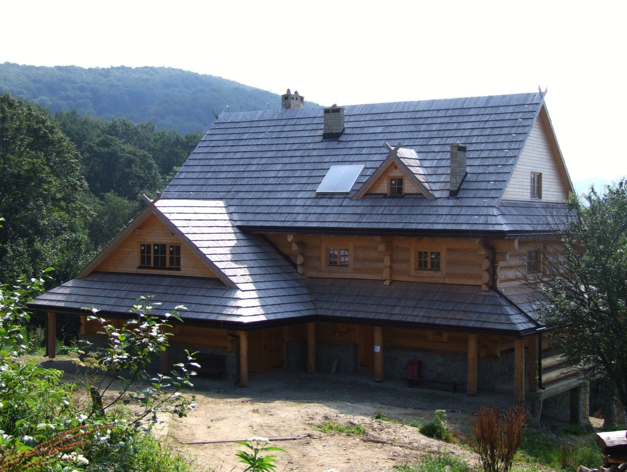 Schronisko "Koliba" na Przysłopie Caryńskim